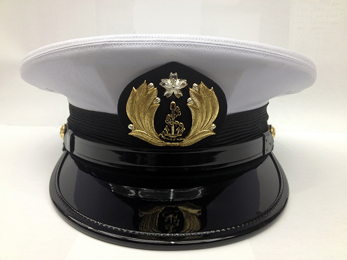 海曹用正帽